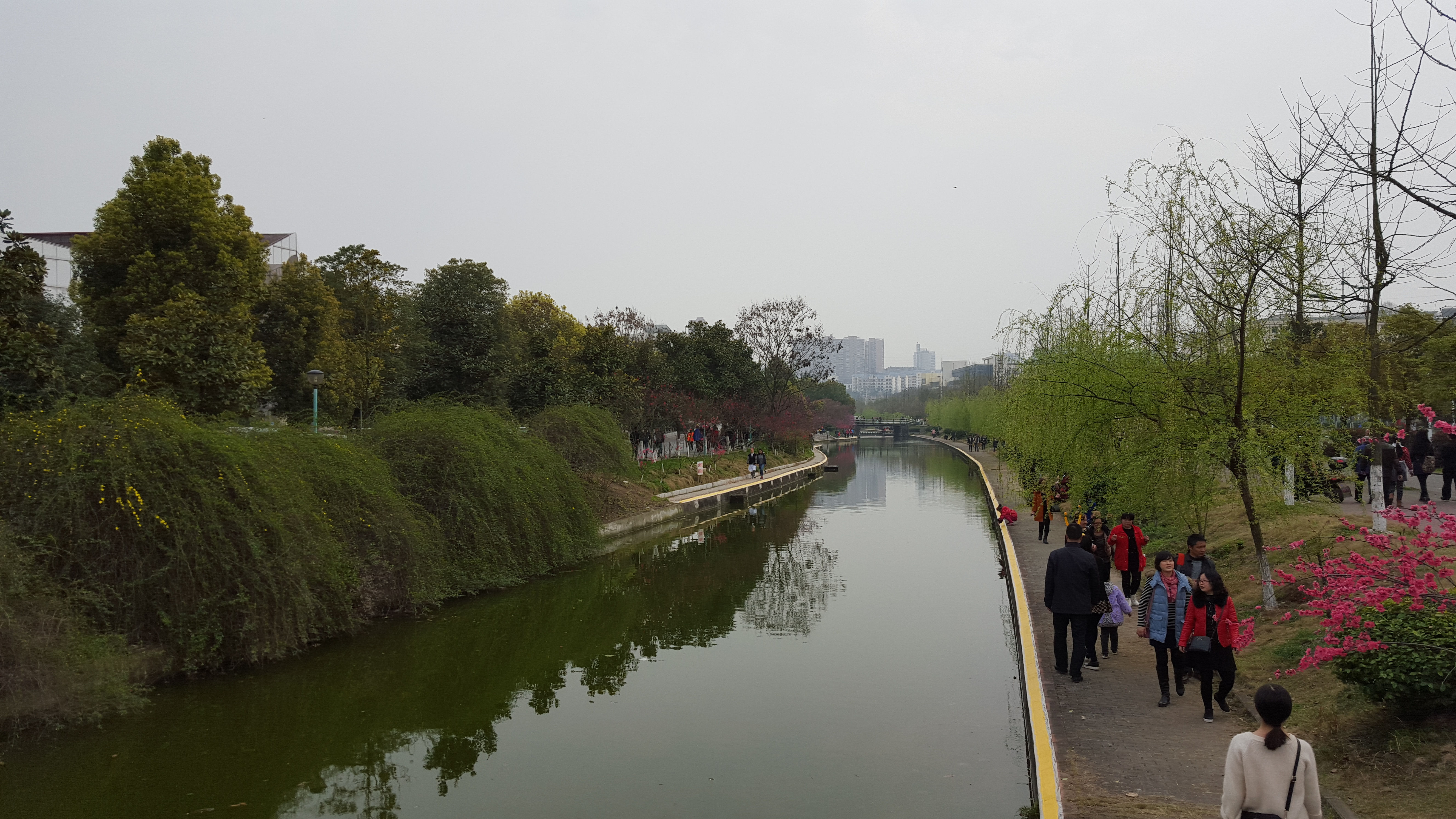 中文（中国大陆）: 三峡大学求索溪